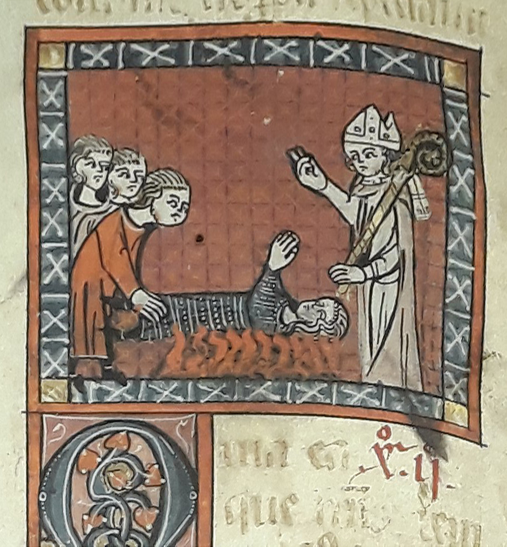 Milagre de San Rosendo no "Vita et Virtutibus sanctissimi Rudesindi Episcopi". Manuscrito orixinal conservado na Biblioteca Nacional de Portugal.